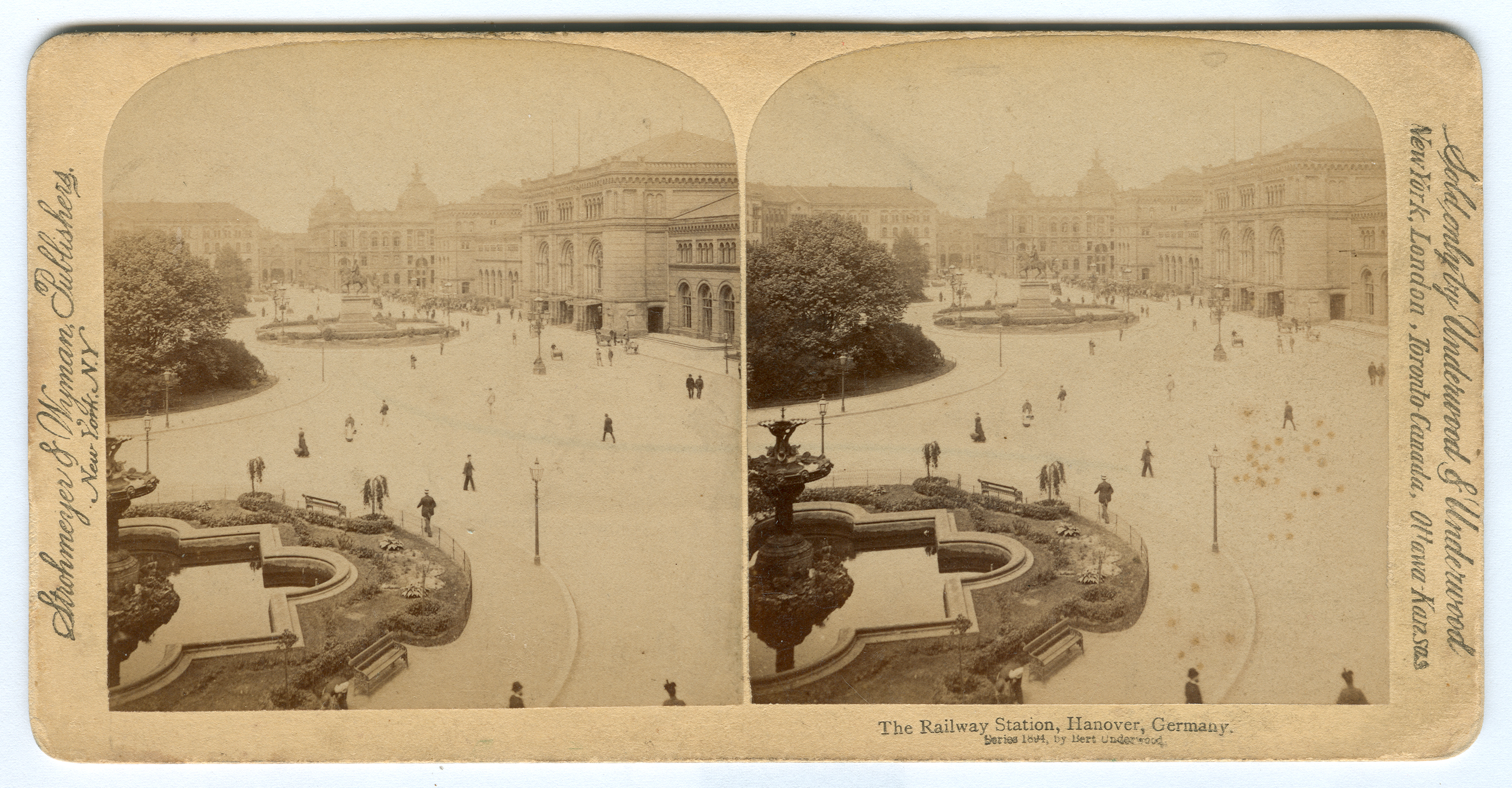 Stereoskopie bzw. Stereo-Karte vom Ernst-August-Platz in Hannover mit Hauptbahnhof, Reiterstatue (Ernst-August-Denkmal) und Hauptpost. Bert Underwood war offensichtlich persönlich in Hannover (Serie 1894). Übersetzung der Seitenränder; links: Strohmeyer & Wyman, Herausgeber, New York, N.Y. rechts: Ausschließlich verkauft durch Underwood & Underwood, New York, London, Toronto-Canada, Ottawa-Kansas. Unten: Serie 1894, von Bert Underwood Format ca. 15,5 x 24,2 cm